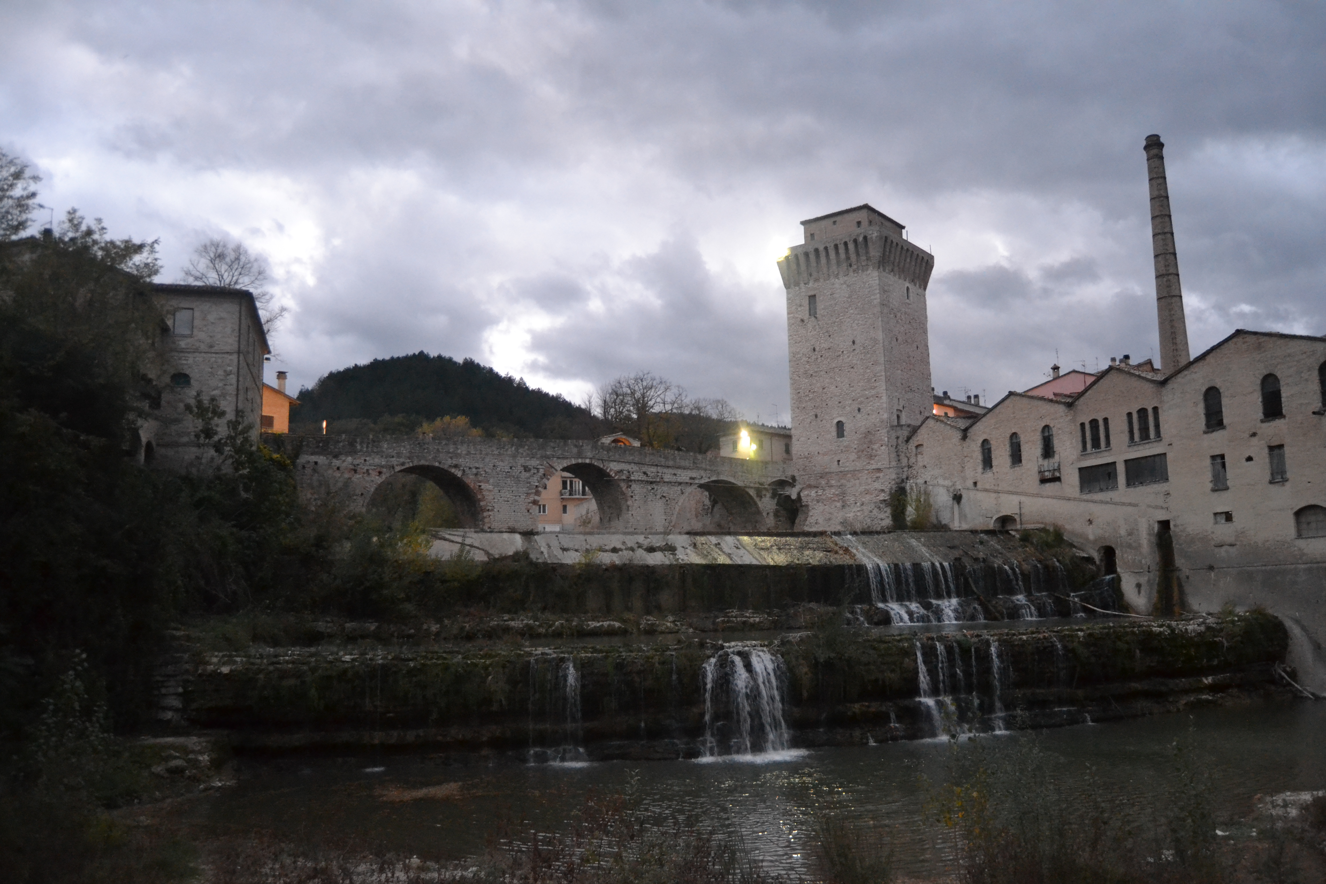 Le Pont, la Tour, la papeterie